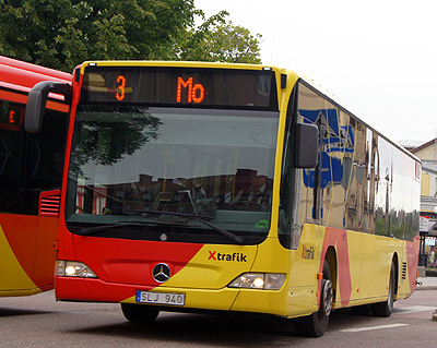 Sundsesplanaden, Hudiksvall 2014-07-03